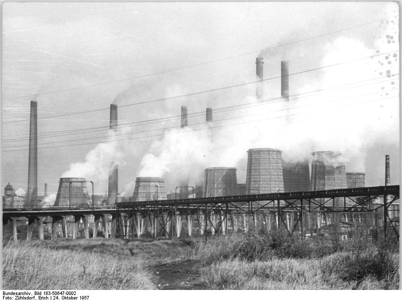 Zentralbild-Zühlsdorf Vgt-Erd 24.10.1957 VEB Elektrochemisches Kombinat Bitterfeld. Ansicht des Kombinats.